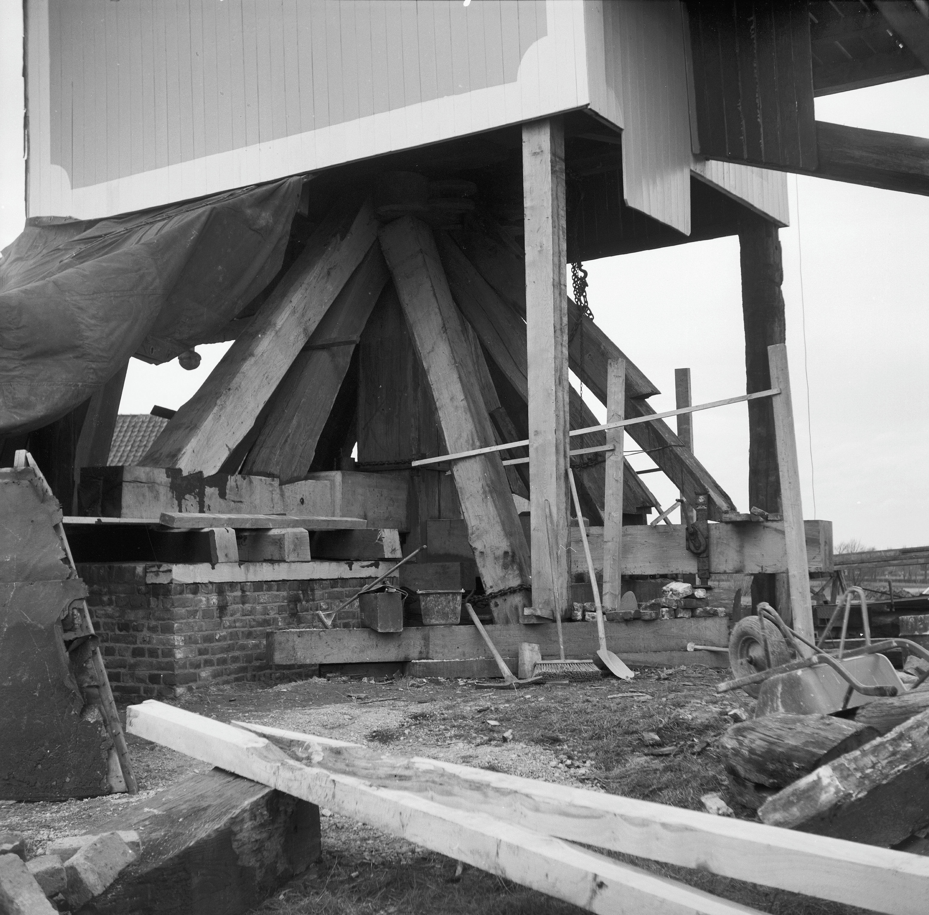 Molen: standaardmolen